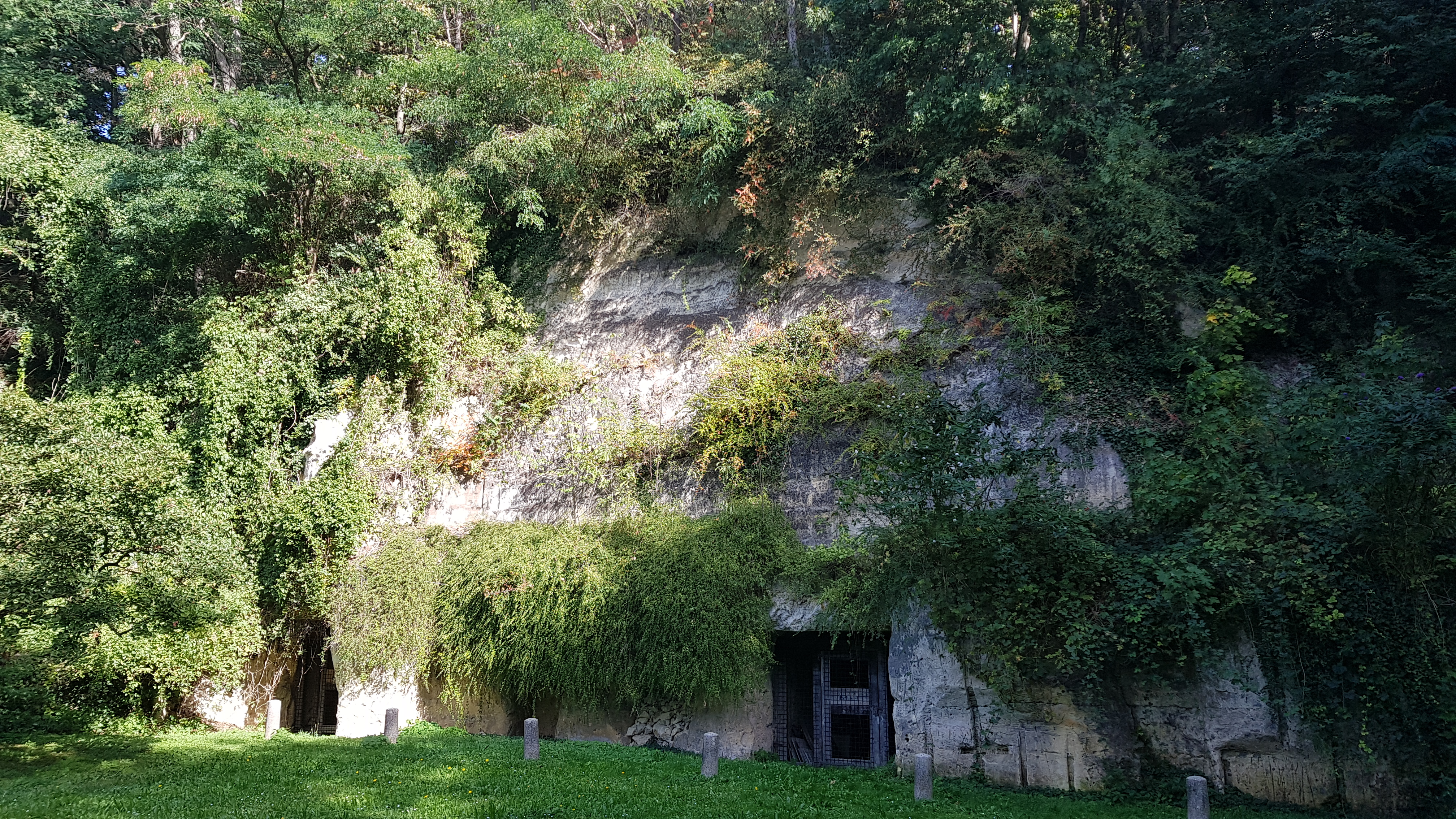 Neven Schark, Maastricht, Nederland